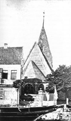 Alte Kirche von Warnemünde